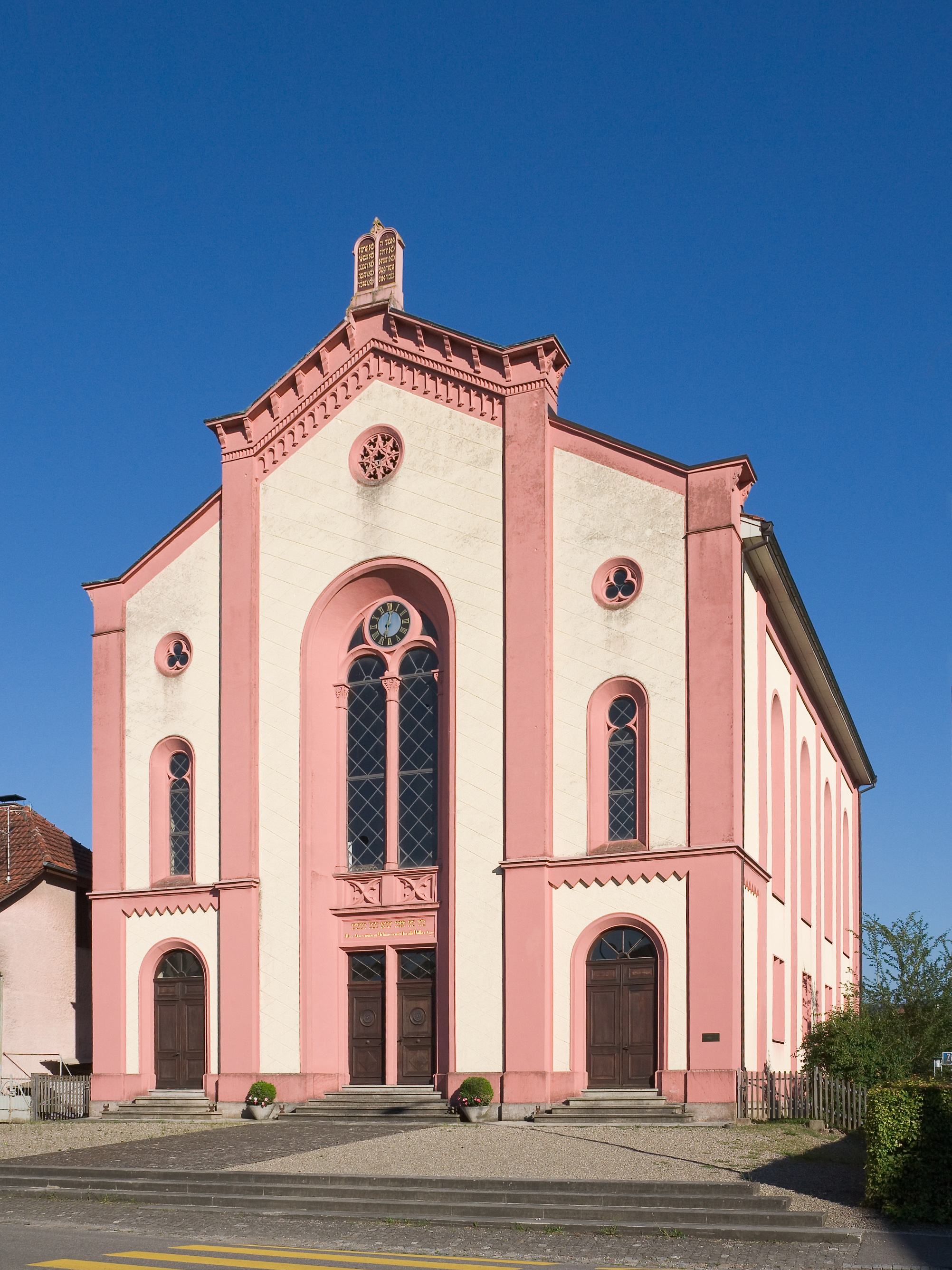 Portalseite der Synagoge in Lengnau AG, Schweiz